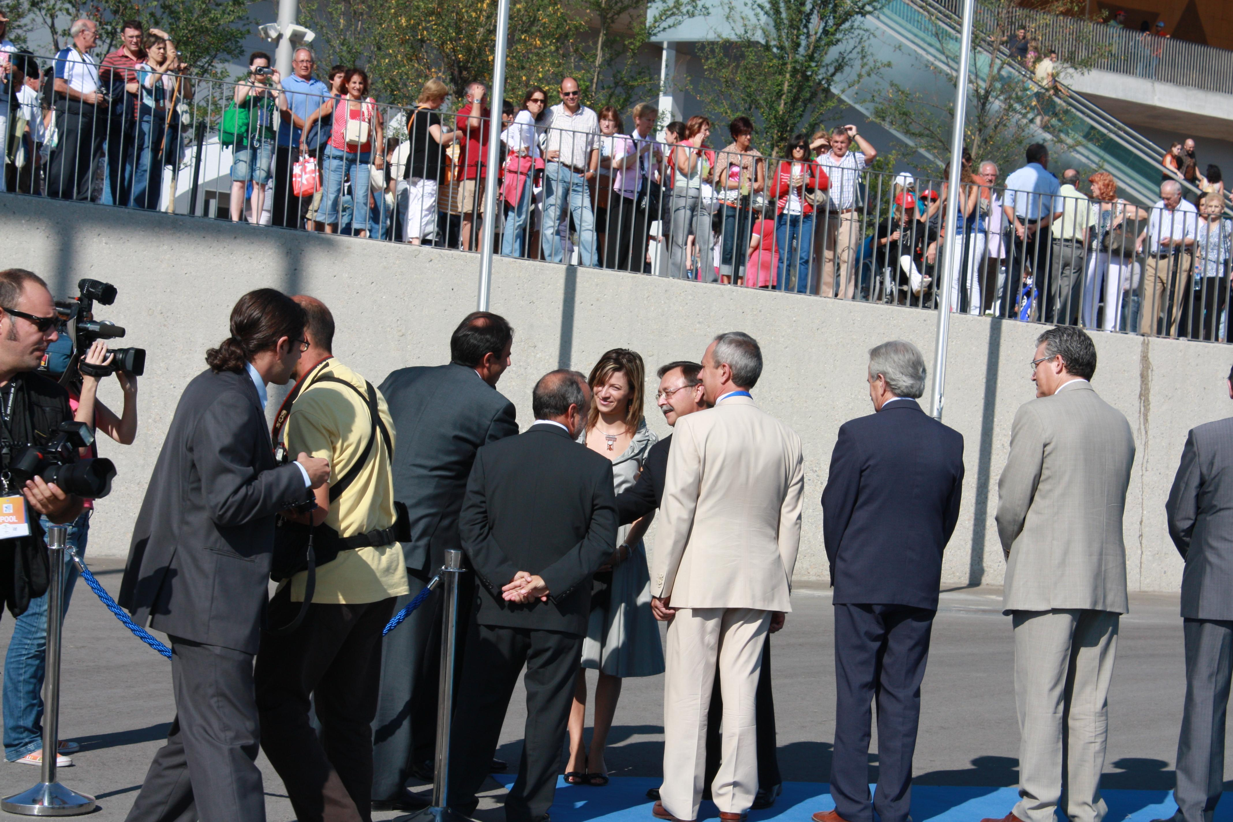 Celebración del Día de Ceuta en la Expo 2008 de Zaragoza